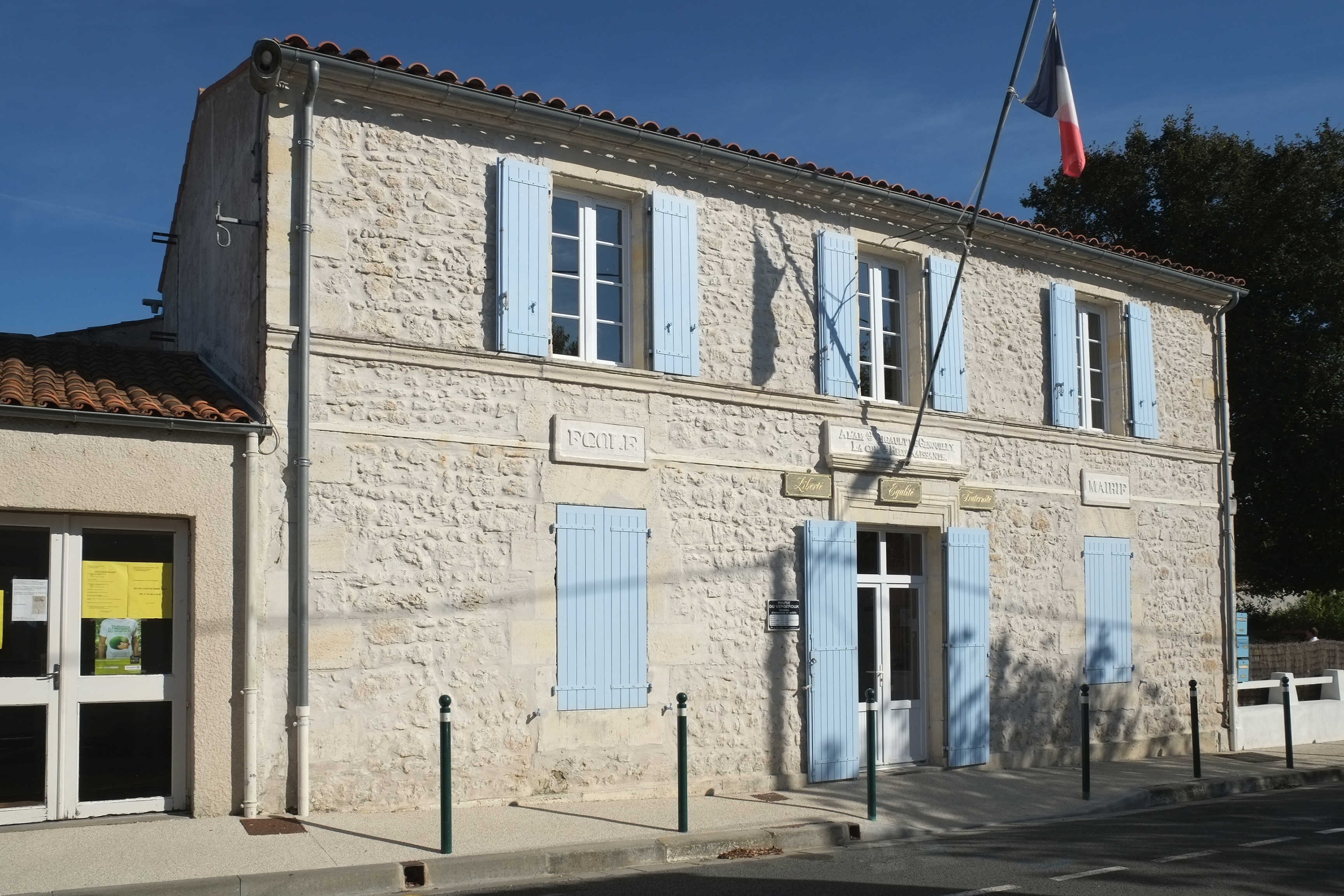 Mairie Vergeroux Charente-Maritime France